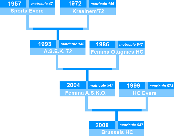 Liste des fusions qui ont donné l'actuel Brussels HC